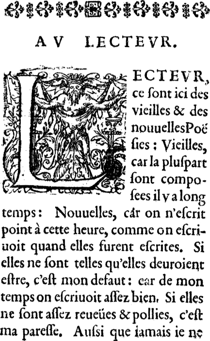 First page of Les Diverses Poésies du Sieur de La Fresnaie by Jean Vauquelin de la Fresnaye (1536 - 1608), French poet